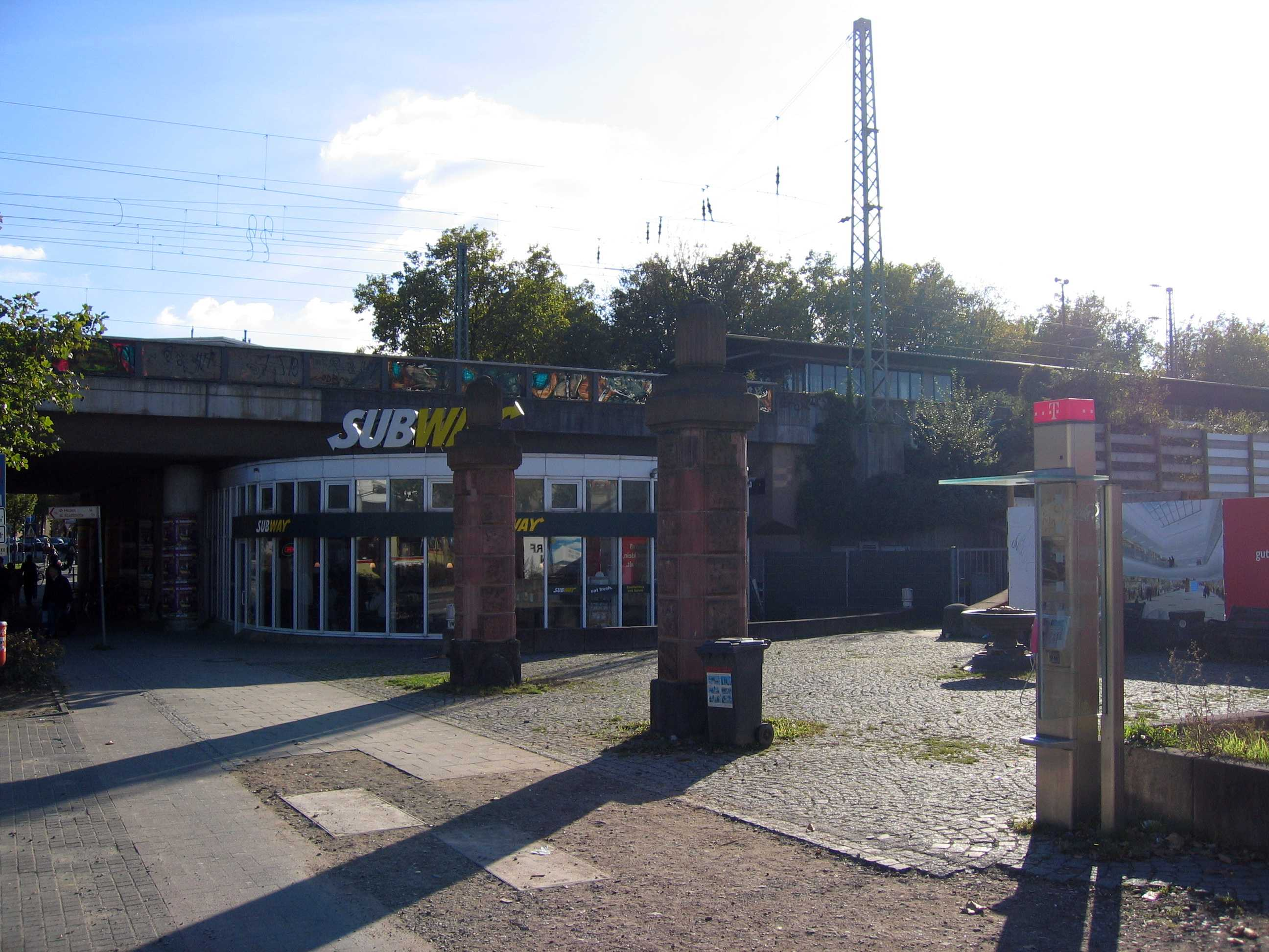 Bahnhof Düsseldorf Bilk, Nordseite. Nordrhein-Westfalen, Deutschland.